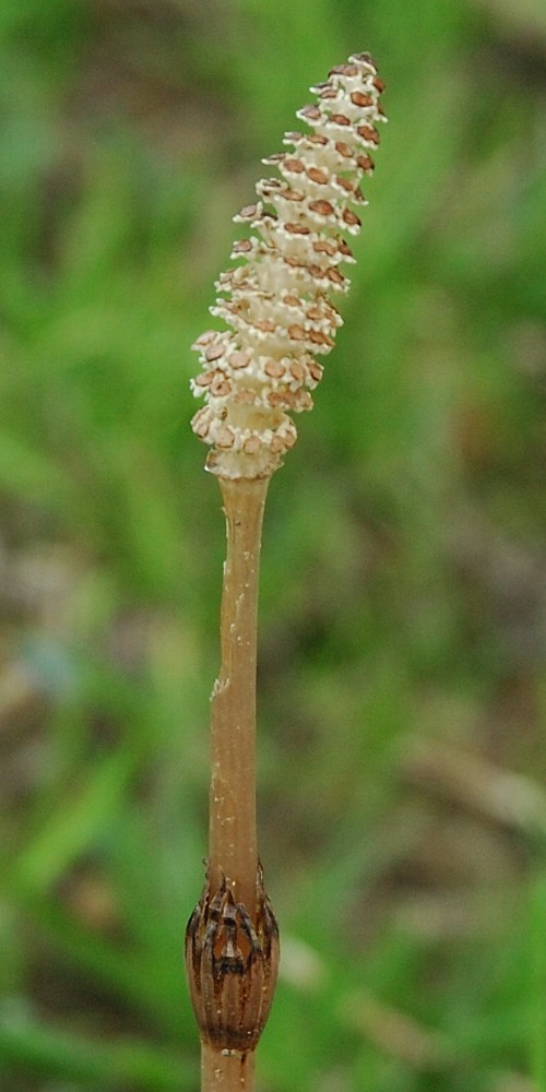 Equisetum arvense (Horse tail, スギナの胞子茎ja:ツクシ)